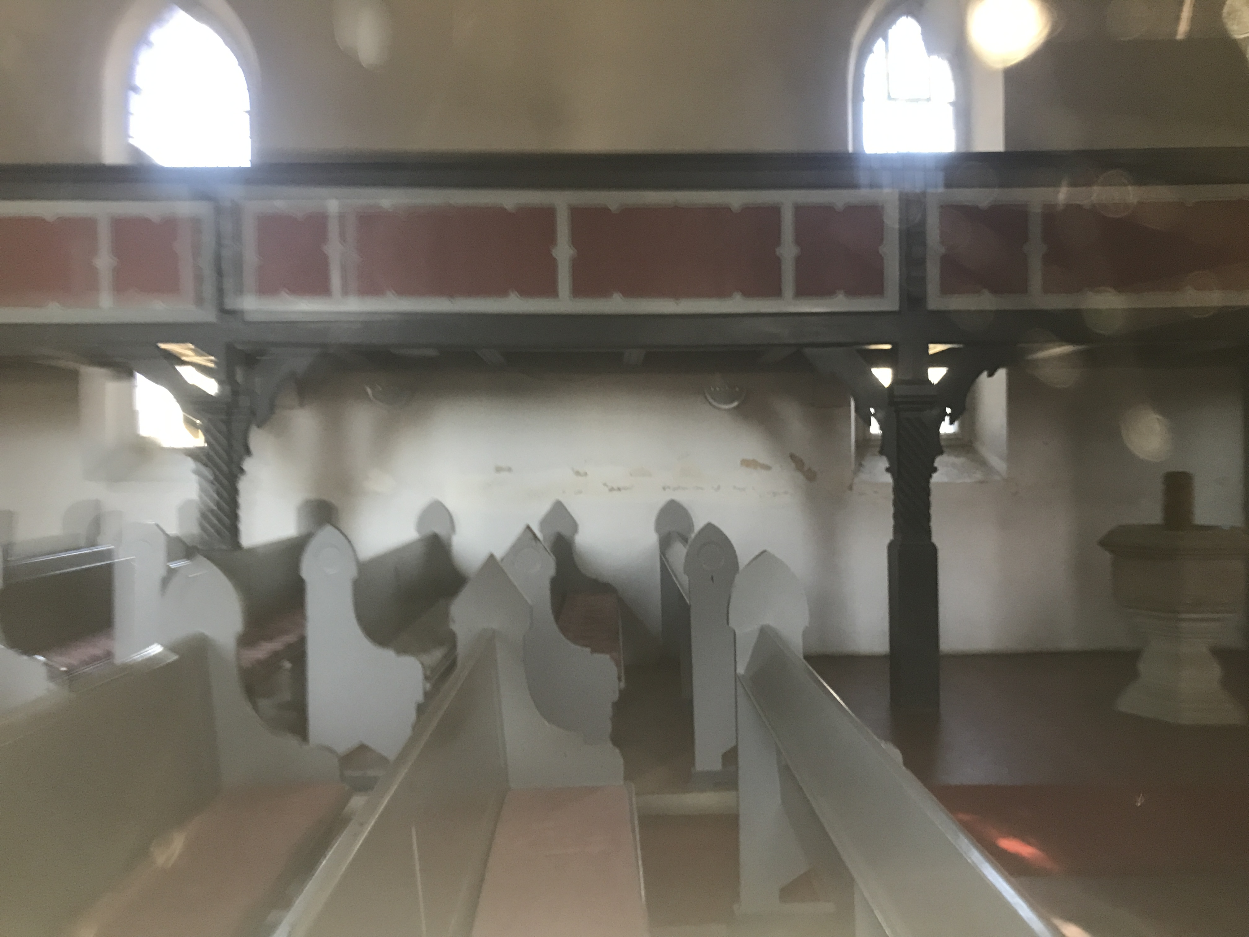 Die Dorfkirche Ragösen ist eine Saalkirche aus dem Jahr 1910, die vermutlich unter Einbeziehung einer mittelalterlichen Feldsteinkirche errichtet wurde. Im Innern steht unter anderem eine Fünte aus dem Jahr 1663.